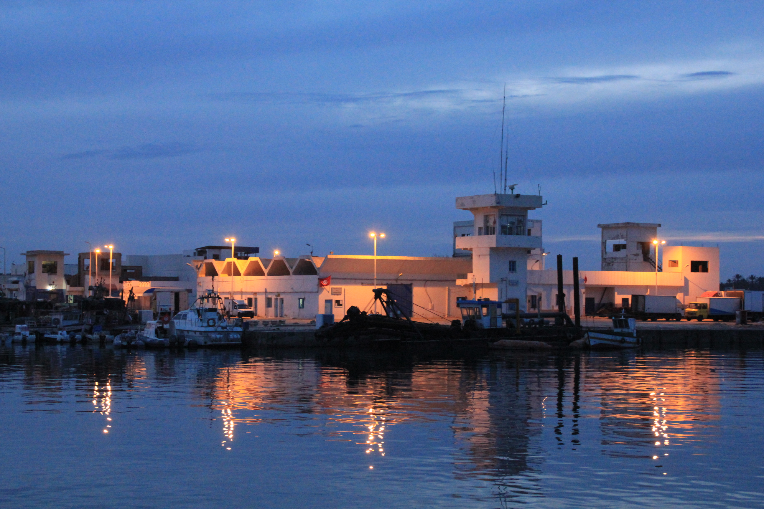 ميناء الصيد البحري - قابس